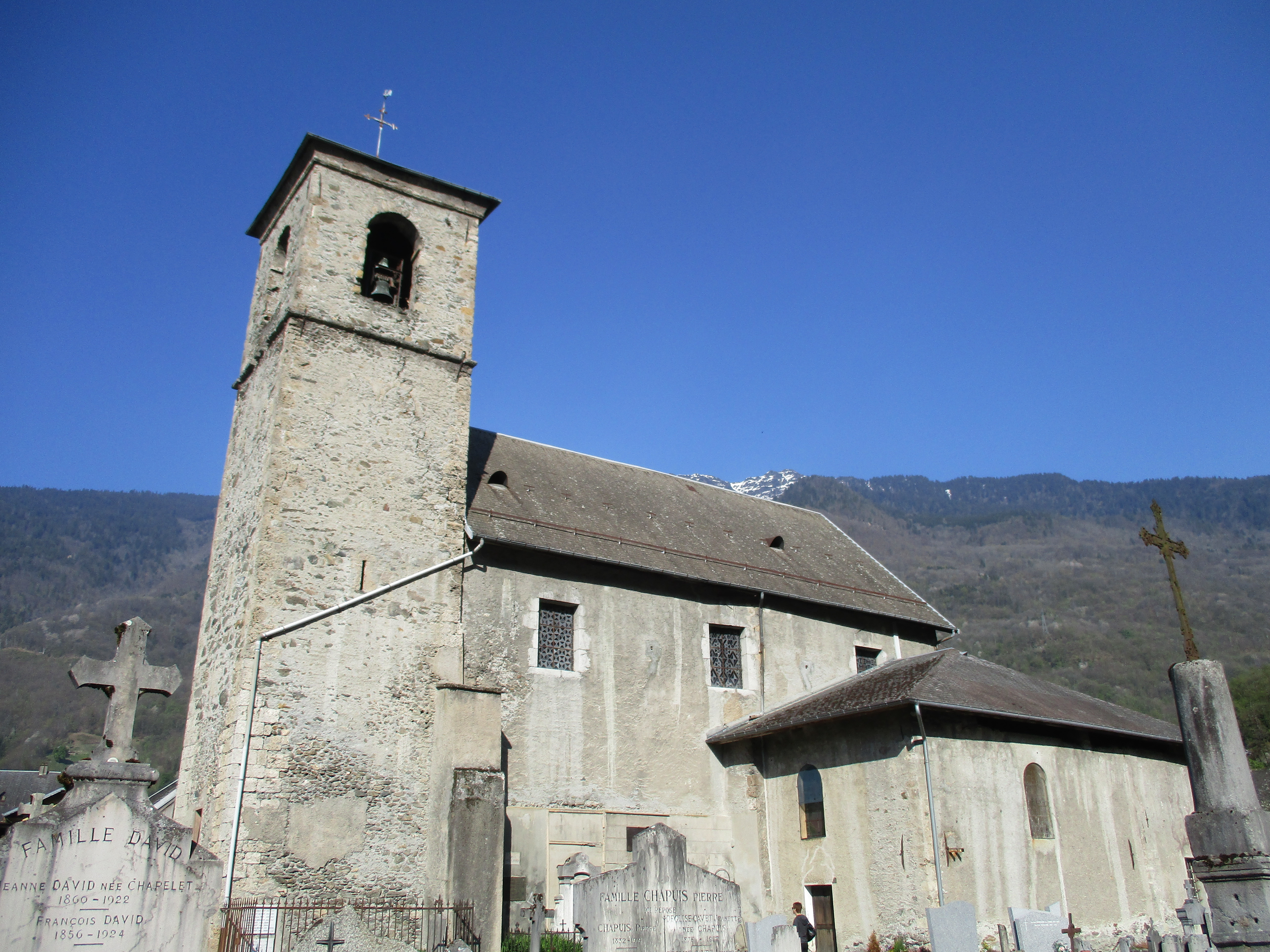 Aperçu de l’Église d'Aiguebelle et de son clocher